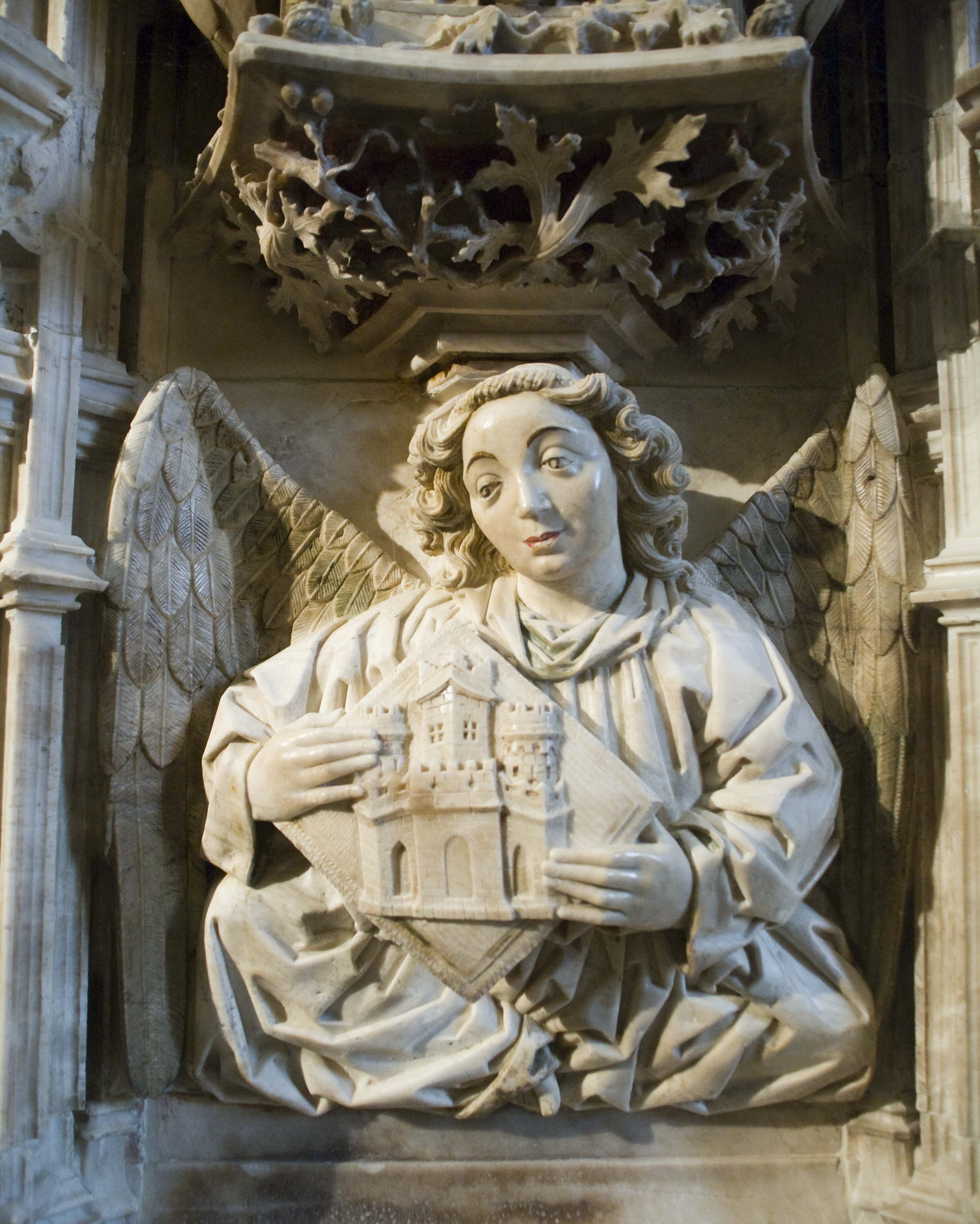 Engel (detail van het hoofdaltaar van de kathedraal van Castelló d'Empúries?)